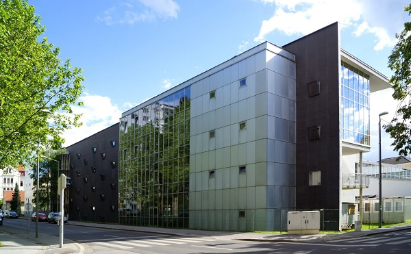 BG und BRG Kirchengasse